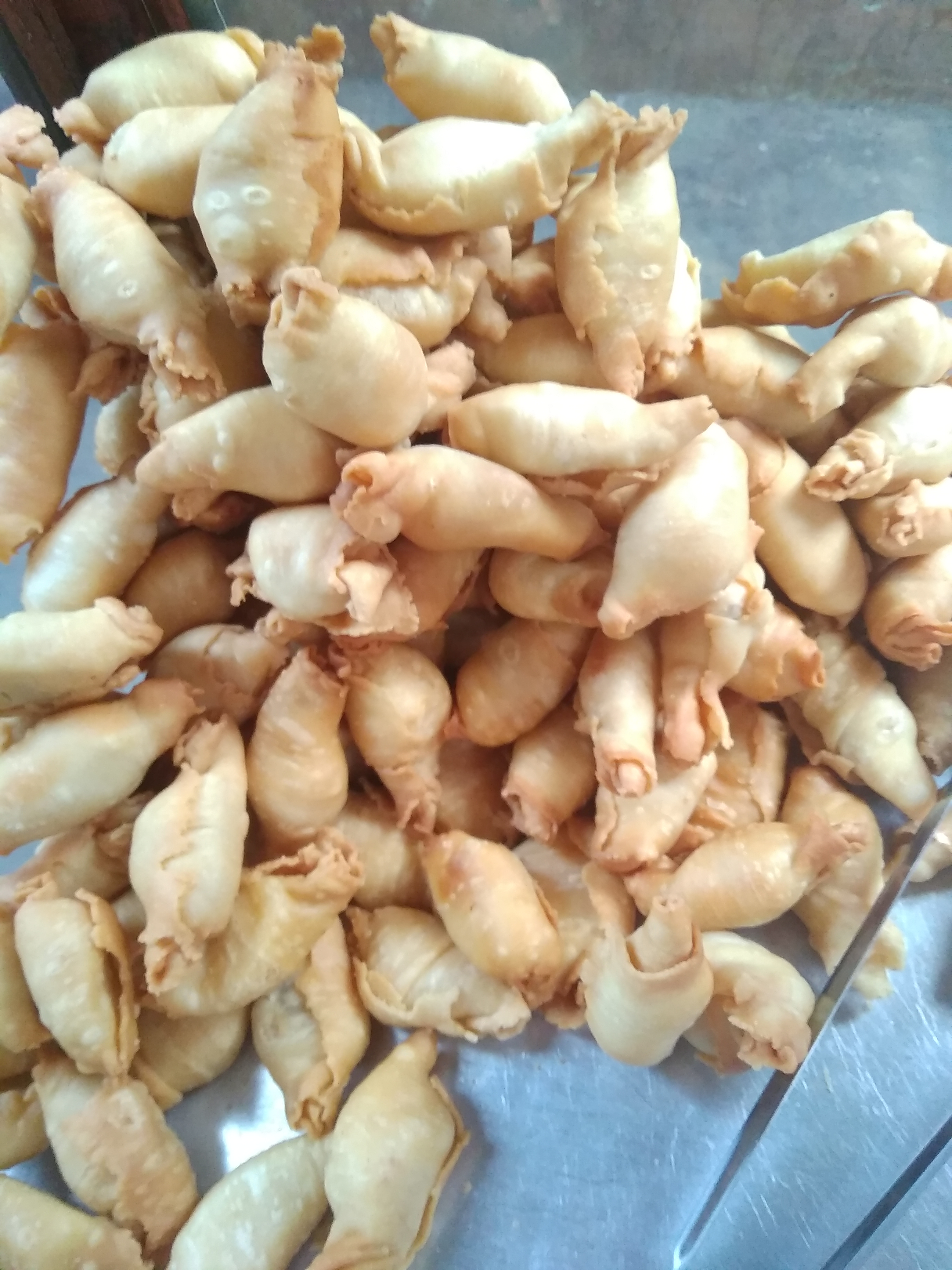 Makanan ringan